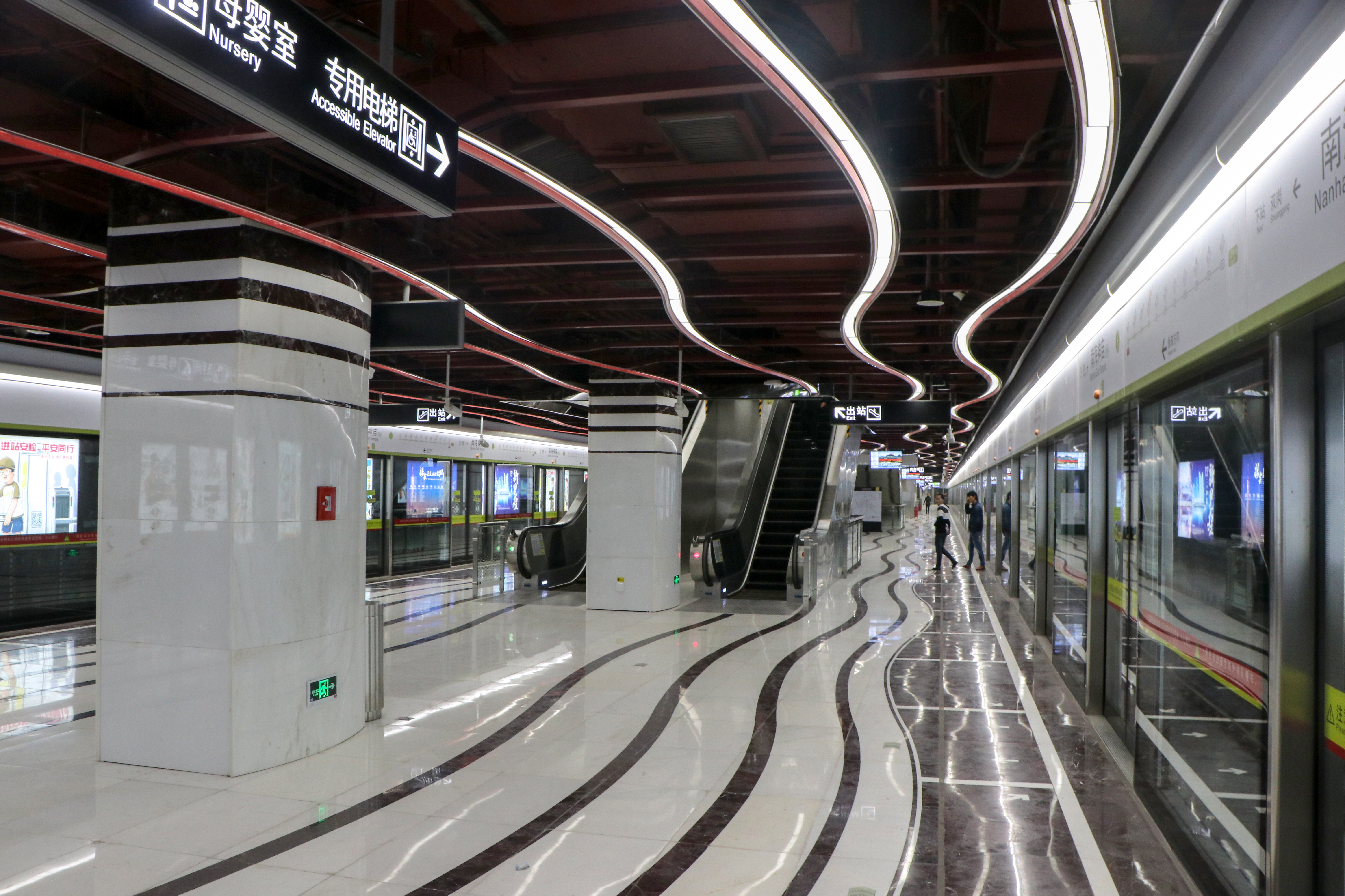 广州地铁南海神庙站